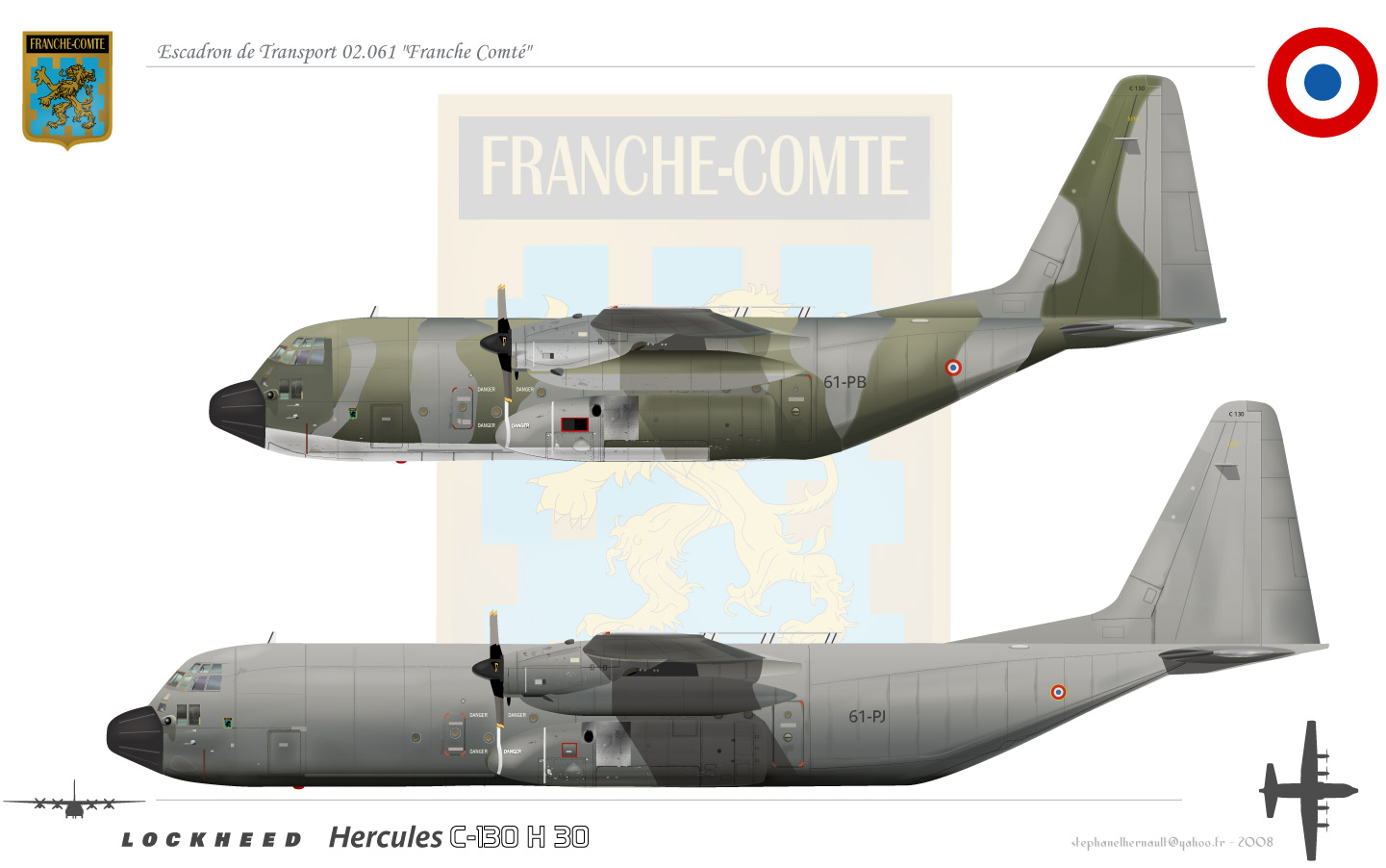 Hercules C 130H & C130H 30 armée de l'air escadron 2/62 franche comté